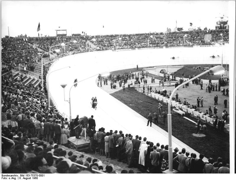 Chemnitz, Thälmann-Stadion, Radrennbahn Zentralbild 8.8.1960 Radweltmeisterschaft 1960 in Karl-Marx-Stadt Über 15.000 Zuschauer erlebten am 8.8.1960 die ersten Vorläufe der Profi-Steherradweltmeisterschaft im Ernst-Thälmann-Stadion zu Karl-Marx-Stadt. Mit diesen beiden Rennen wurde der zweite Teil der Radweltmeisterschaften 1960 eröffnet. UBz: Blick auf die Bahn des Thälmann-Stadions.